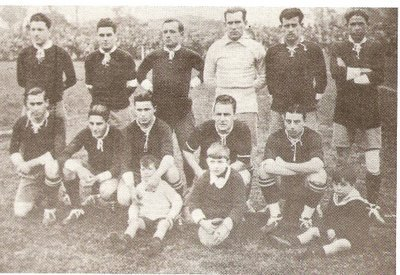 Independiente team that won the "Copa Competencia" in 1925.